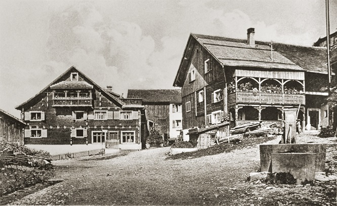 Dorfplatz Triesen mit dem Haus «Linde» auf einer Postkarte aus dem Anfang des 20. Jahrhundert. In der «Linde» befand sich 1809–29 die Schulstube, später ein Dorfladen. Seit 1946 beherbergt es das Gasthaus «Linde».